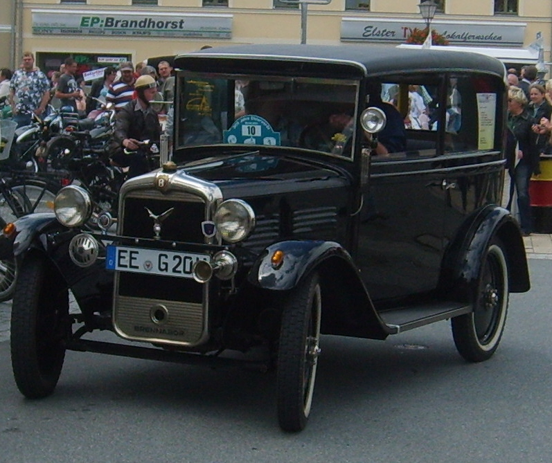 Oldtimerrallye Elsterwerda am 19. Juni 2011